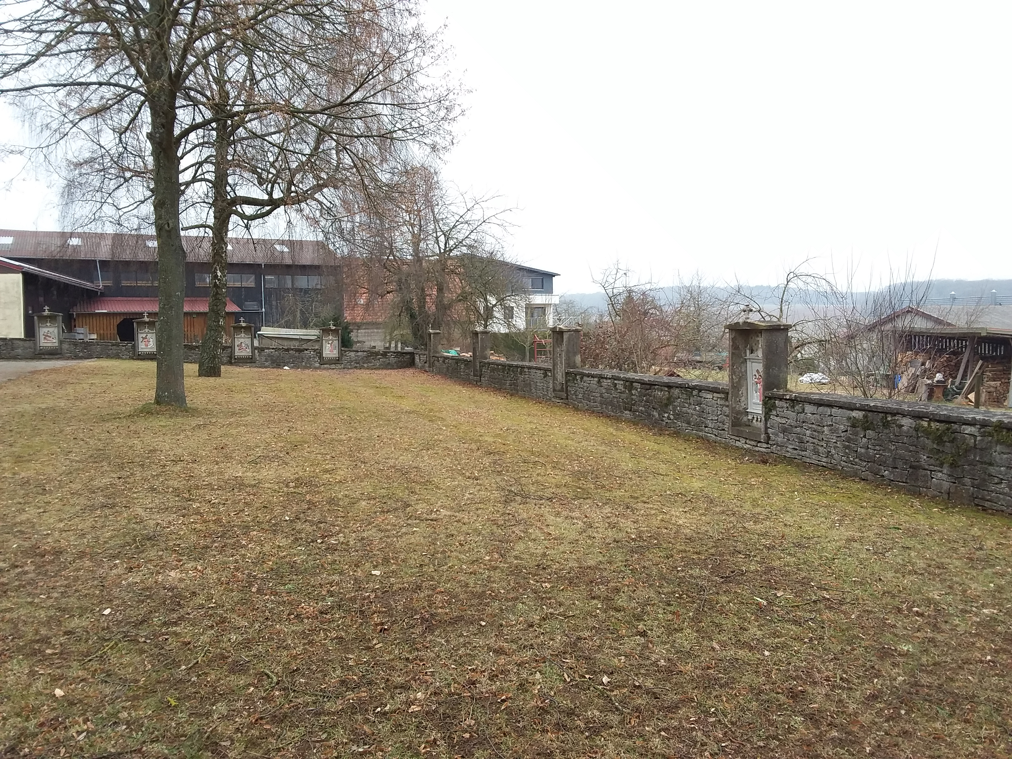 bei Am Kirchberg 4 (Vilchband 2017)